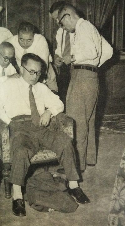 造船疑獄の立件について、佐藤栄作首相による指揮権発動により衆議院に喚問され、野党の追及を受ける佐藤藤佐検事総長